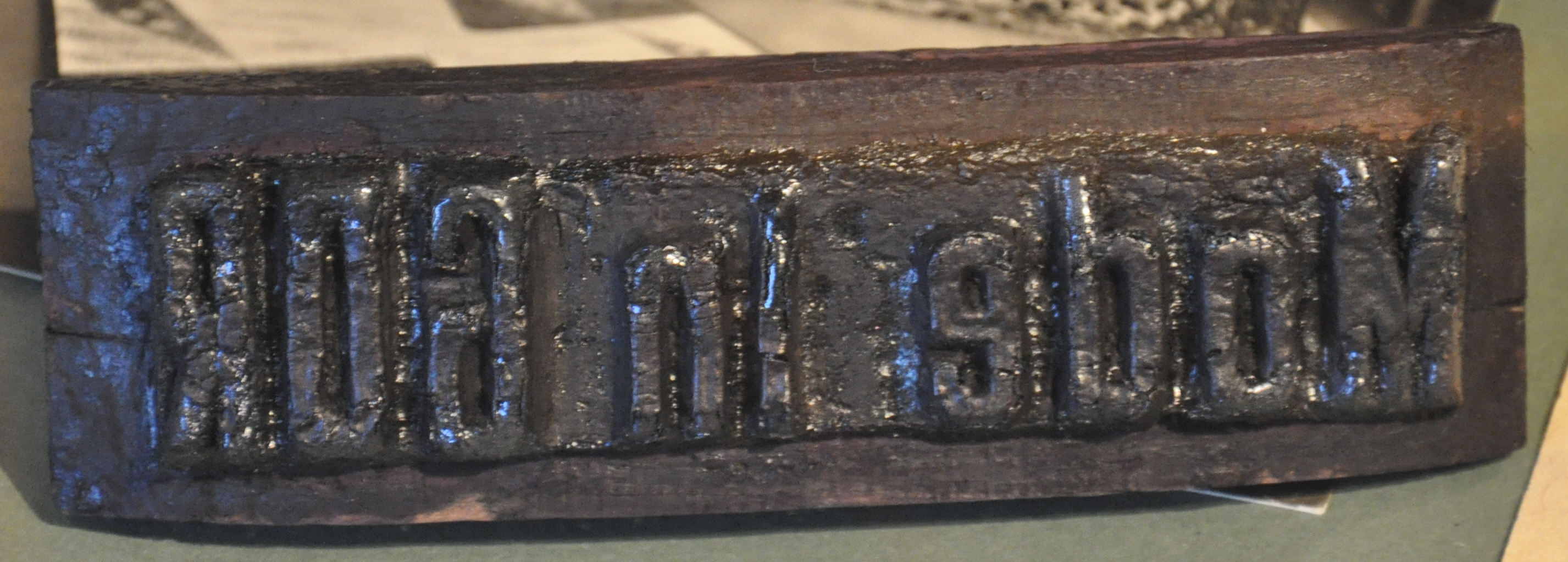 Oelsnitz/Vogtland, Teppich-Museum Schloss Voigtsberg Stempel "Made in GDR"